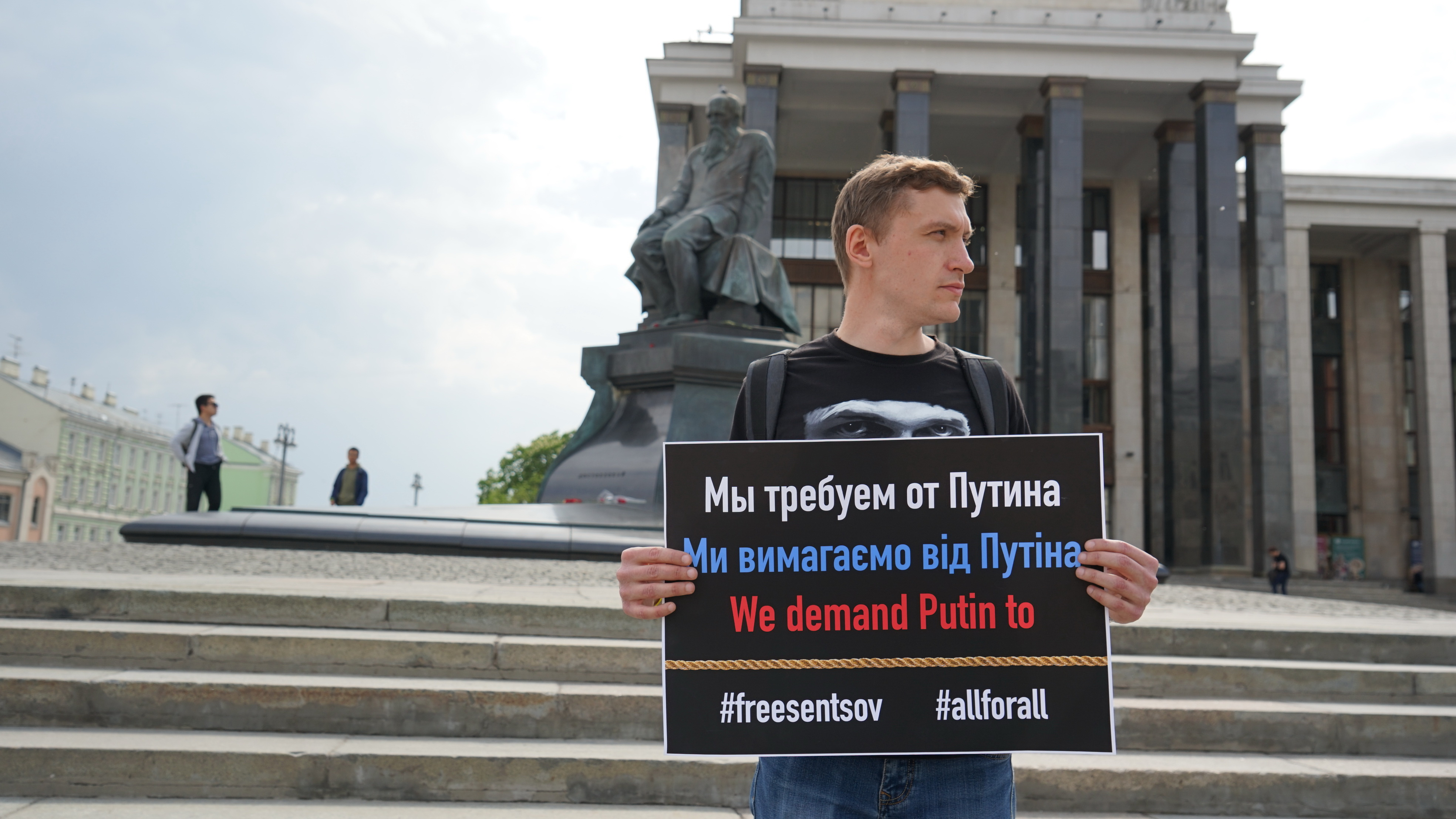 Константин Котов на одиночном пикете у РГБ в поддержку украинских политзаключенных. 10 мая 2019